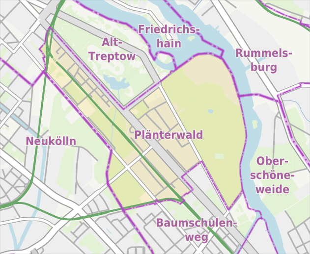 Übersichtskarte der Straßen und Ortslagen in Berlin-Plänterwald